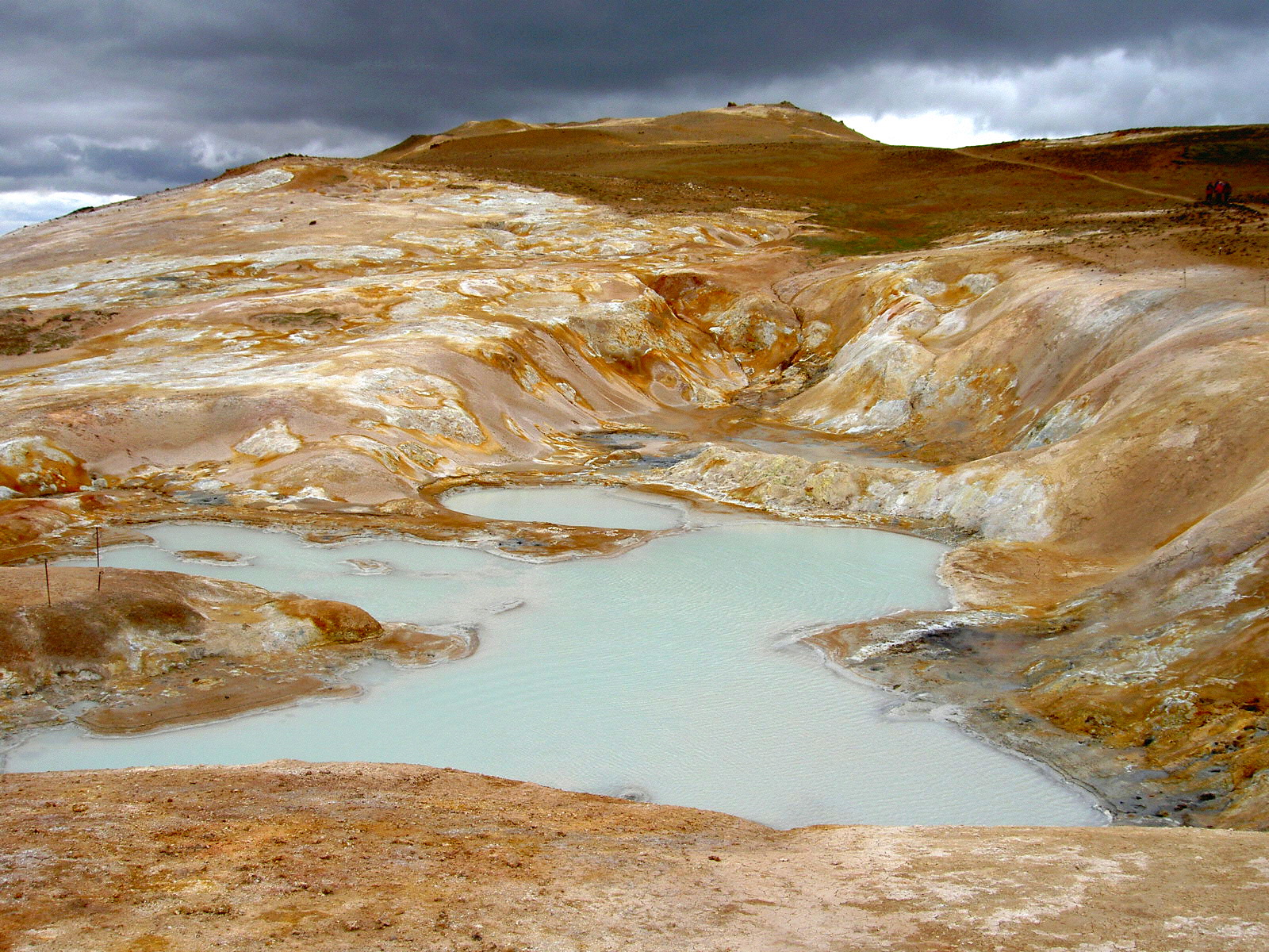 Sulfur Lake at Leirhnjúkur / Iceland.